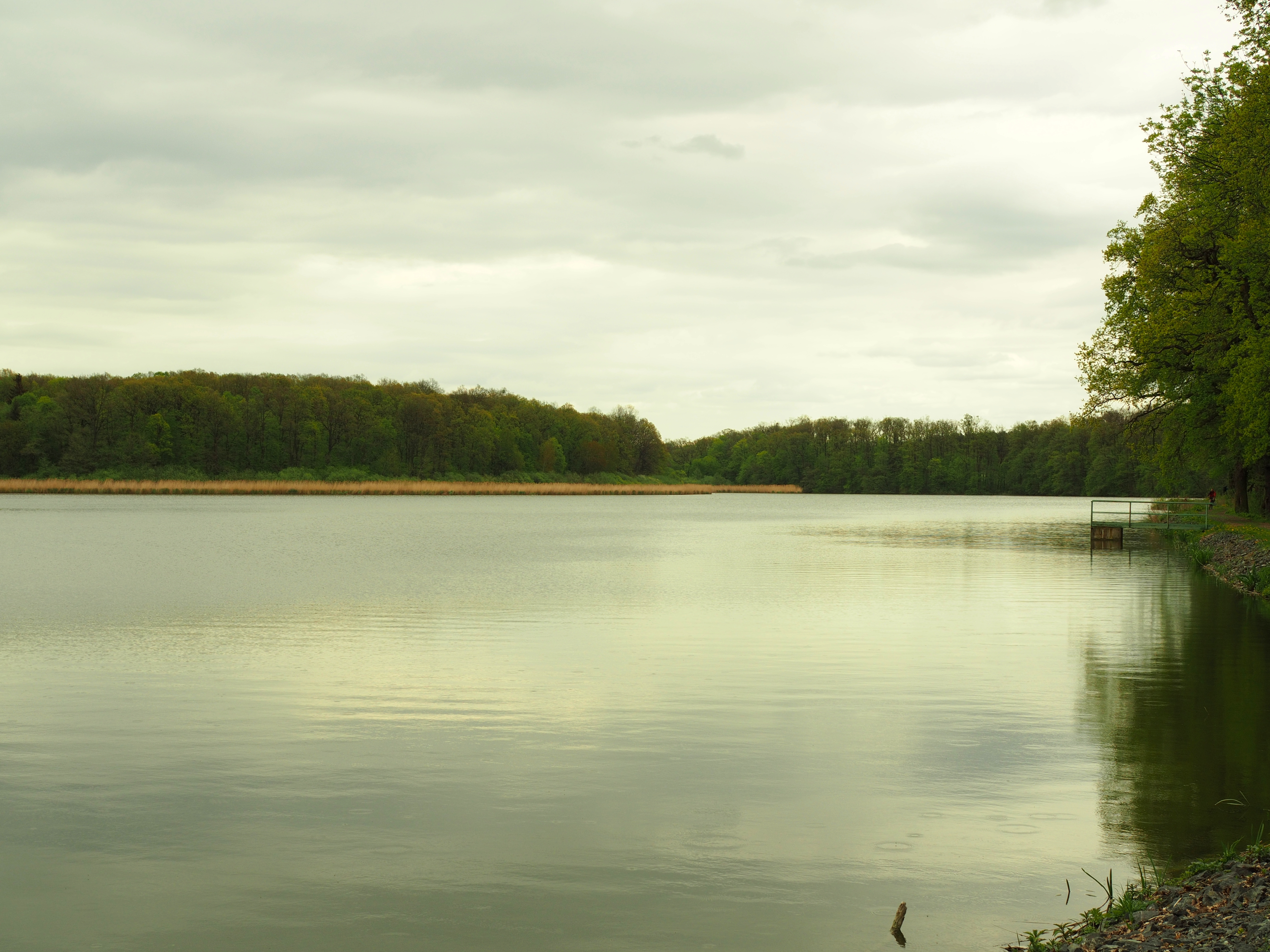 Bučický rybník u Rožďalovic (Bučický pond near Rožďalovice) Project: Chráněná území